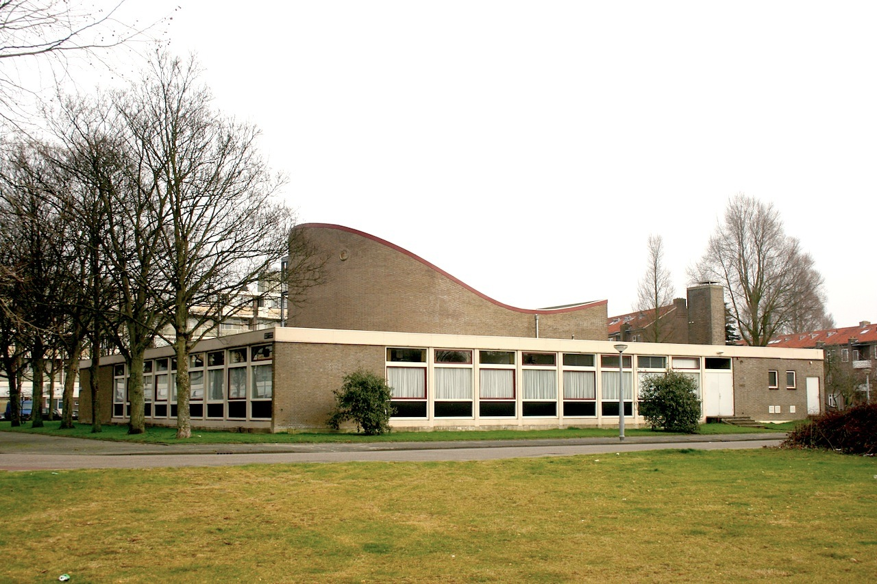 Hervormde Kerk De Ark, Slotervaart, Amsterdam Nieuw-West. Foto: Erik Swierstra.